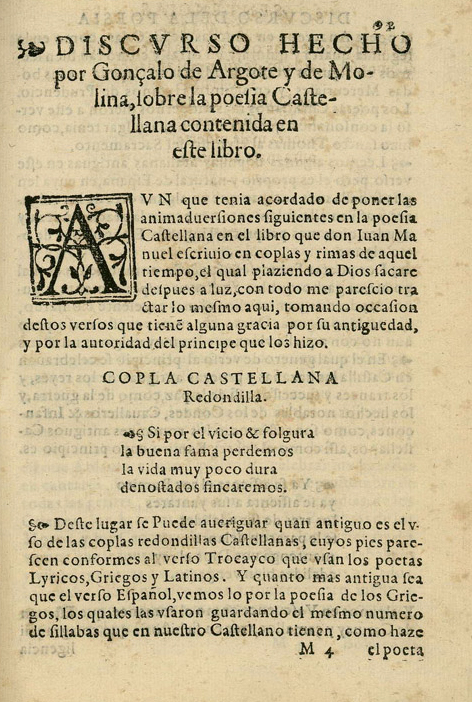 Fol. 92 r. Íncipit del Discurso sobre la poesía castellana..., en Don Juan Manuel, El conde Lucanor, Gonzalo Argote de Molina (ed. lit.), Sevilla, Hernando Díaz, 1575.